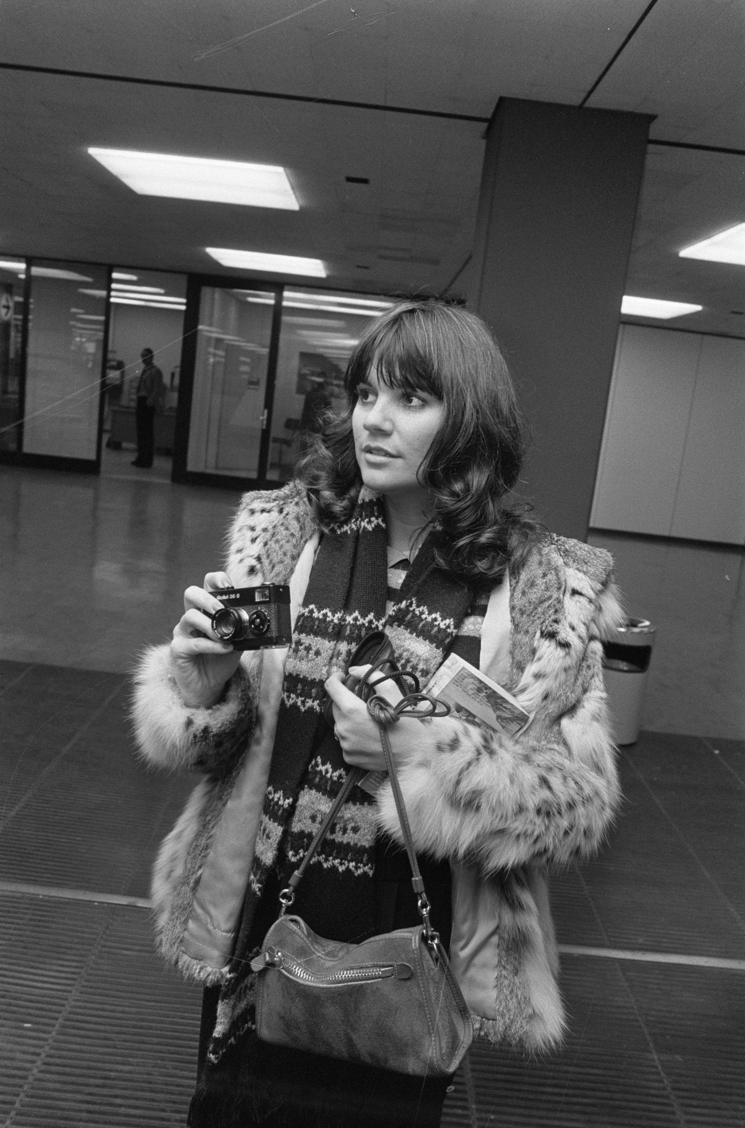 Collectie / Archief : Fotocollectie Anefo Reportage / Serie : [ onbekend ] Beschrijving : Zangeres Linda Ronstadt op Schiphol Datum : 20 november 1976 Locatie : Noord-Holland, Schiphol Trefwoorden : zangeressen Fotograaf : Bogaerts, Rob / Anefo Auteursrechthebbende : Nationaal Archief Materiaalsoort : Negatief (zwart/wit) Nummer archiefinventaris : bekijk toegang 2.24.01.05 Bestanddeelnummer : 928-8975